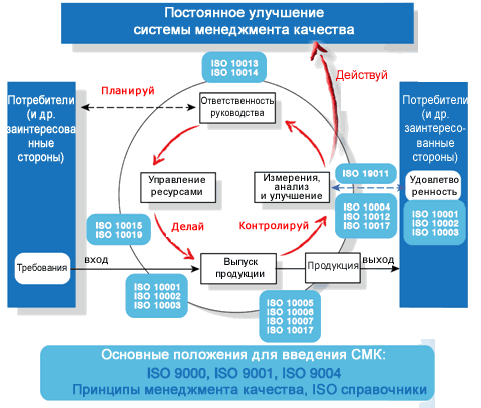 Применение стандартов ISO / TC 176 в процессном подходе.